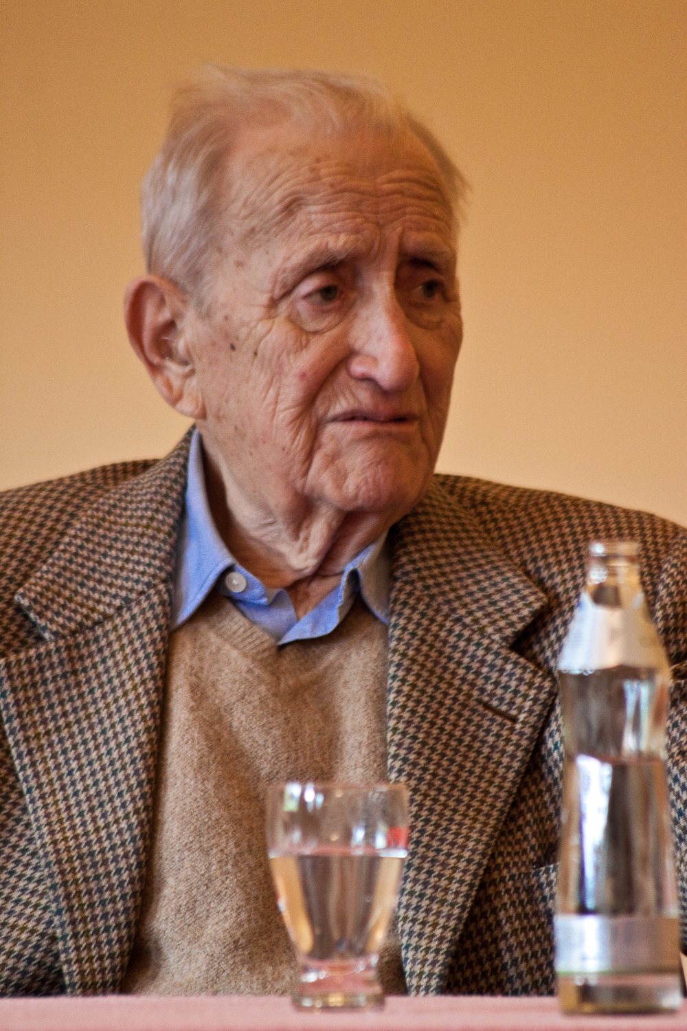 Fritz Molden beim Forum Alpbach 2010